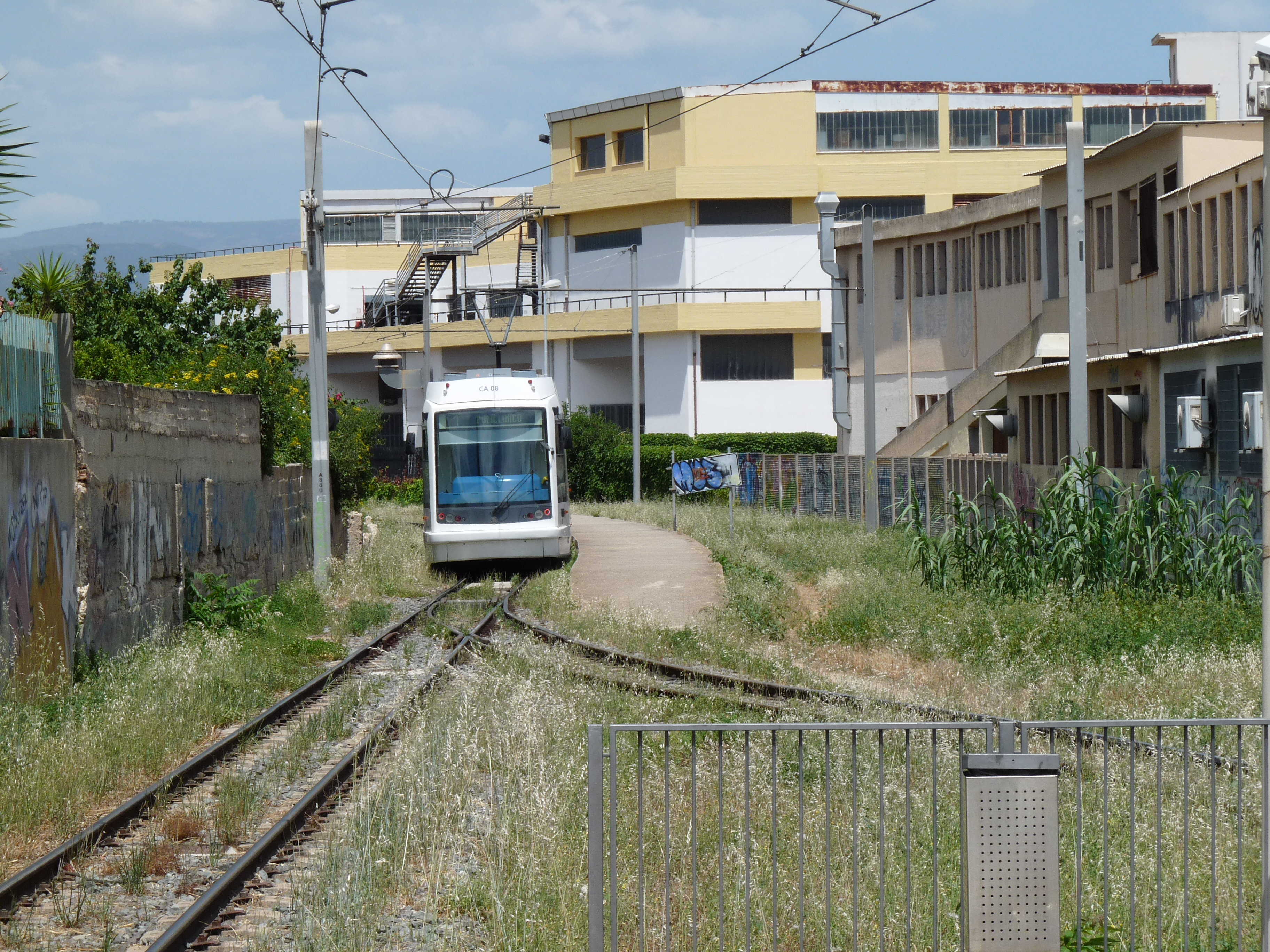 De tram in Gagliari. Oude spoorhalte